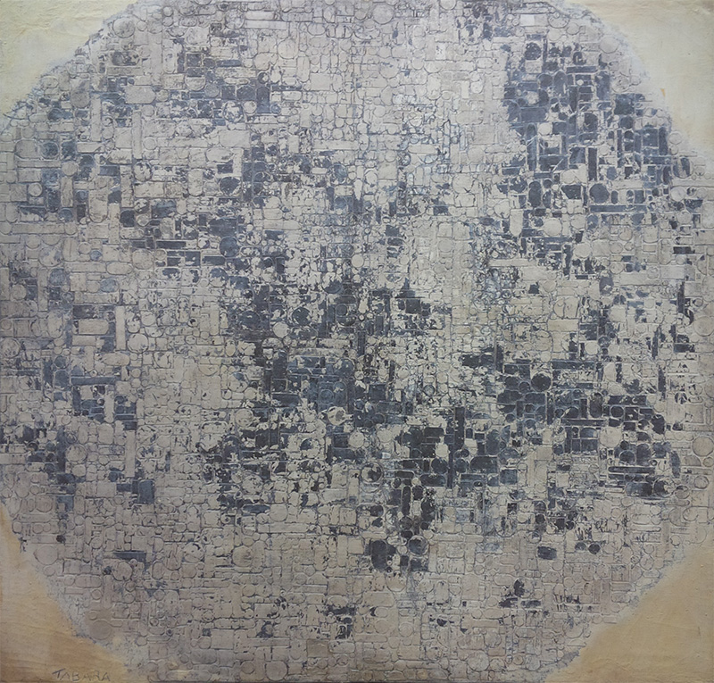 Obra de Enrique Tábara